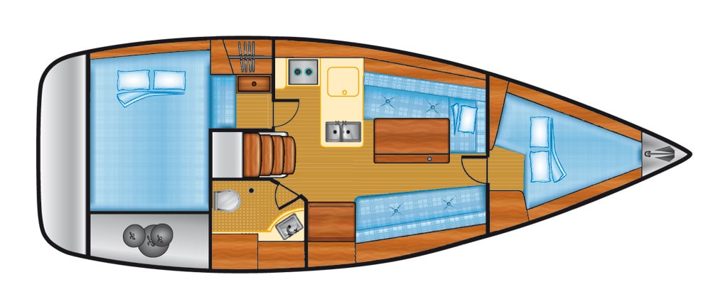 Innenaufteilung der Oceanis 31